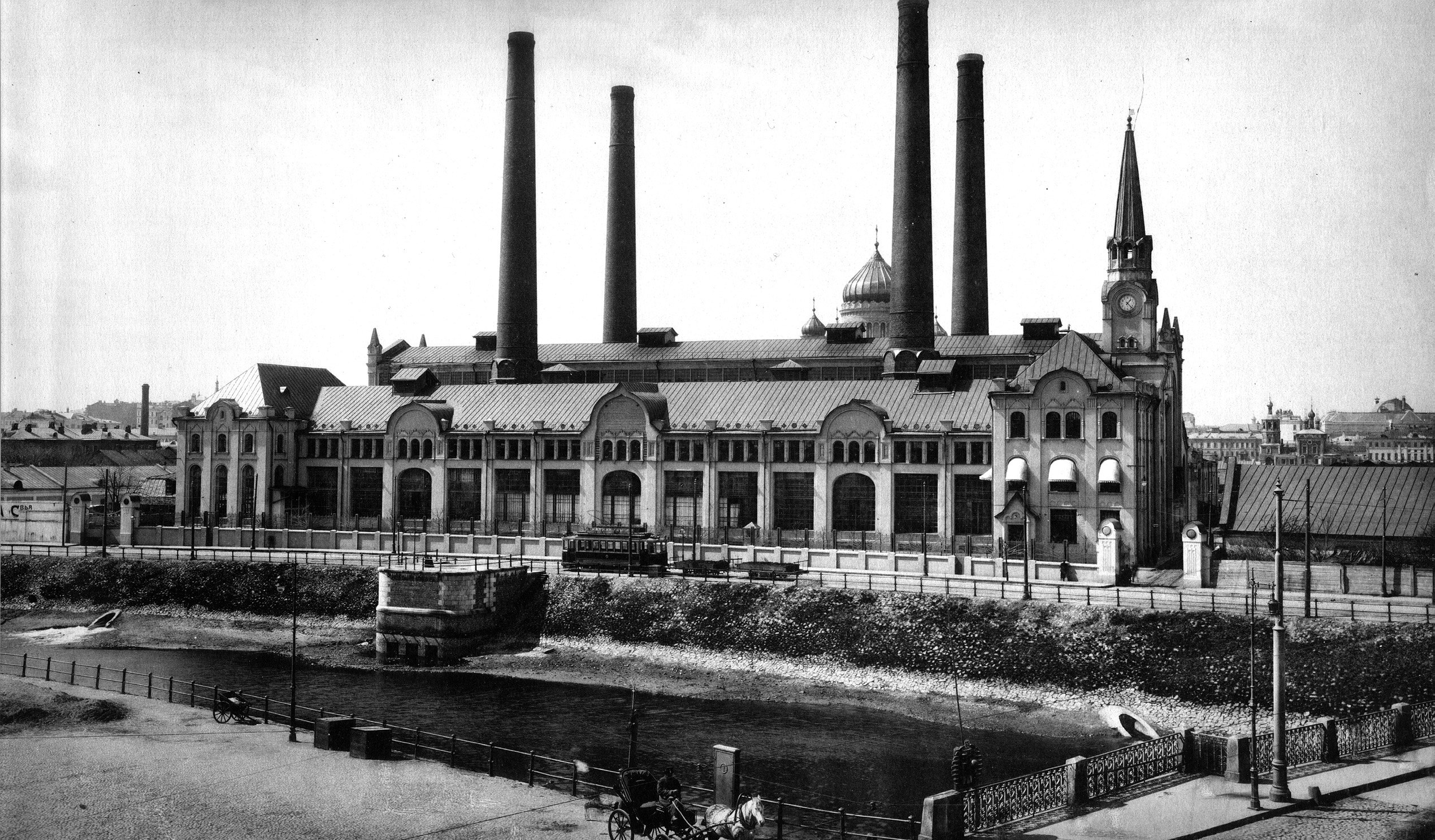 152. Городская Центральная Электрическая станцiя на Винно-Соляномъ дворЪ. (Болотная набережная, Москва)